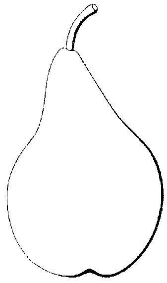 Beurré d'Angleterre-André Leroy, 1867, p. 297, Dict. de pomologie.